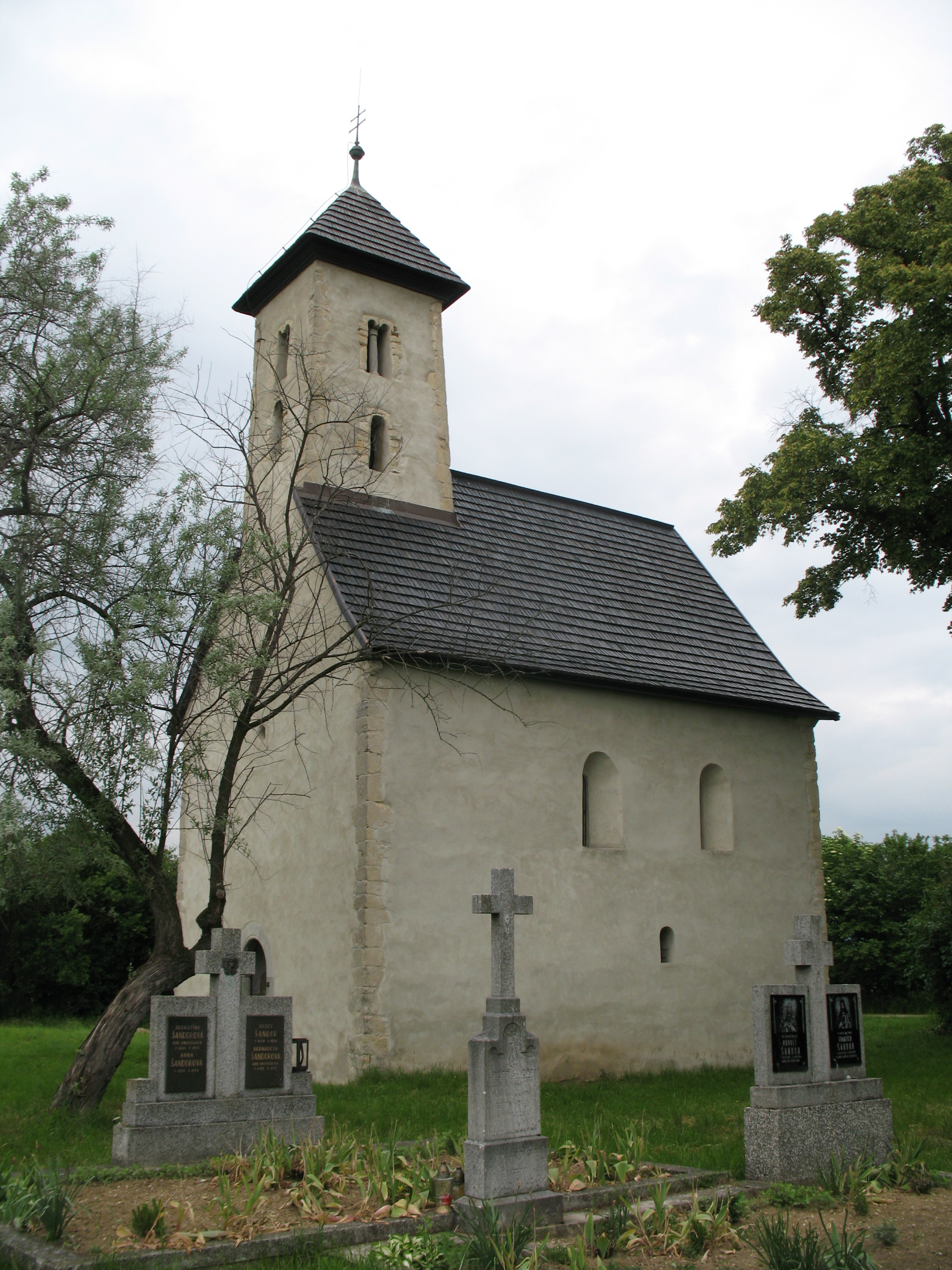 Pominovec